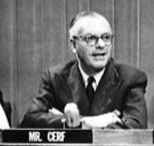 amerykański wydawca i osobowość telewizyjna